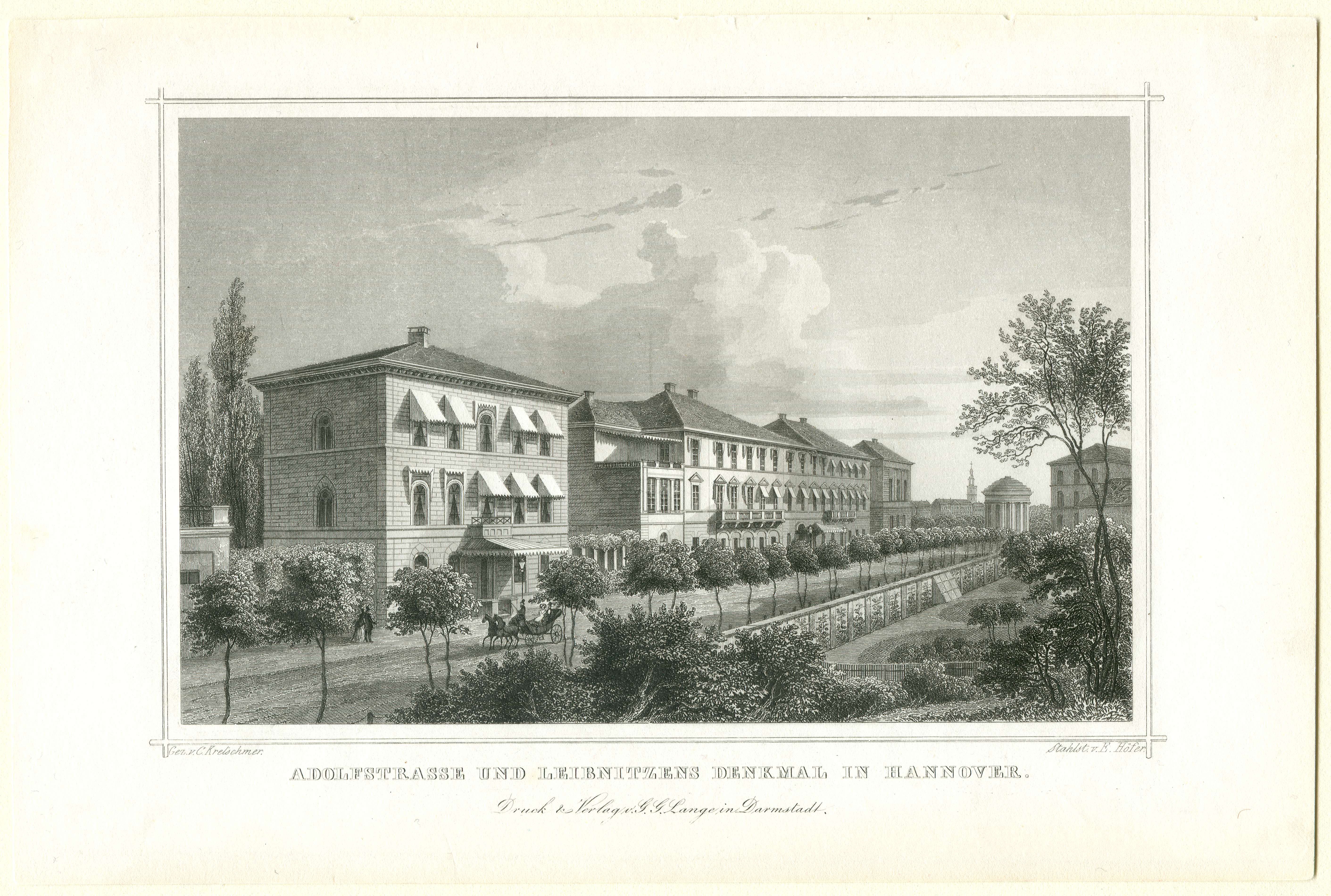 Original-Stahlstich "Adolfstrasse und Leibnitzens Denkmal in Hannover" - so der Untertitel dieses Stahlstichs, der spätestens 1858 herausgekommen sein dürfte in dem Buch "Das Königreich Hannover und das Herzogthum Braunschweig..." von Dr. Otto von Heinemann, Druck und Verlag von Gustav Georg Lange, Darmstadt. So falsch der angegebene Name von Leibniz im Untertitel des Stiches, so falsch dürfte auch der abgekürzte Vorname des Schöpfers der ursprünglichen Zeichnung sein: Mit großer Sicherheit handelt es sich nicht um "C. Kretschmer", sondern um den in der Calenberger Neustadt geborenen, hannoverschen Zeichenlehrer Wilhelm Kretschmer. Die Adolfstraße ist benannt nach Herzog Adolph Ferdinand von Cambridge (1774-1850), dem jüngsten Bruder des Königs Ernst August I. von Hannover. Sie wurde - gemeinsam mit der Molthanstraße und der Kommandanturstraße - erst im zweiten Viertel des 19. Jahrhunderts angelegt anstelle eines Teils der ehemaligen Stadtbefestigung. Erst nach einer Teil-Zuschüttung des Grabens am "Adolfswalls" begann hier die Besiedelung, zunächst mit Militärbauten, dann auch mit anspruchsvollen Wohngebäuden. Am Ende der Strasse steht noch der Leibniztempel an seinem ursprünglichen Platz an der Esplanade des Waterlooplatzes, der 1936 in den Georgengarten versetzt wurde. Im Hintergrund sieht man die Aegidienkiche. Durch die Luftangriffe auf Hannover im Zweiten Weltkrieg wurden die 3 Wohnhäuser zerstört, bis heute ist dort nur ein großer umzäunter, unbefestigter Parkplatz. Im Zuge von "Hannover City 2020 +", einem großangelegtem Umgestaltungsvorhaben der Stadt Hannover mit Bürgerbeteiligung für große Teile der Innenstadt, soll auch dieser leere Platz umgestaltet werden. Hierzu haben zahlreiche Architekten-Büros bereits Skizzen eingereicht. Die Ausstellung dieser Zwischenergebnisse im Neuen Rathaus endete am 26. März 2010. Der städtebauliche-landschaftsplanerische Ideenwettbewerb soll bis Sommer 2010 abgeschlossen sein.